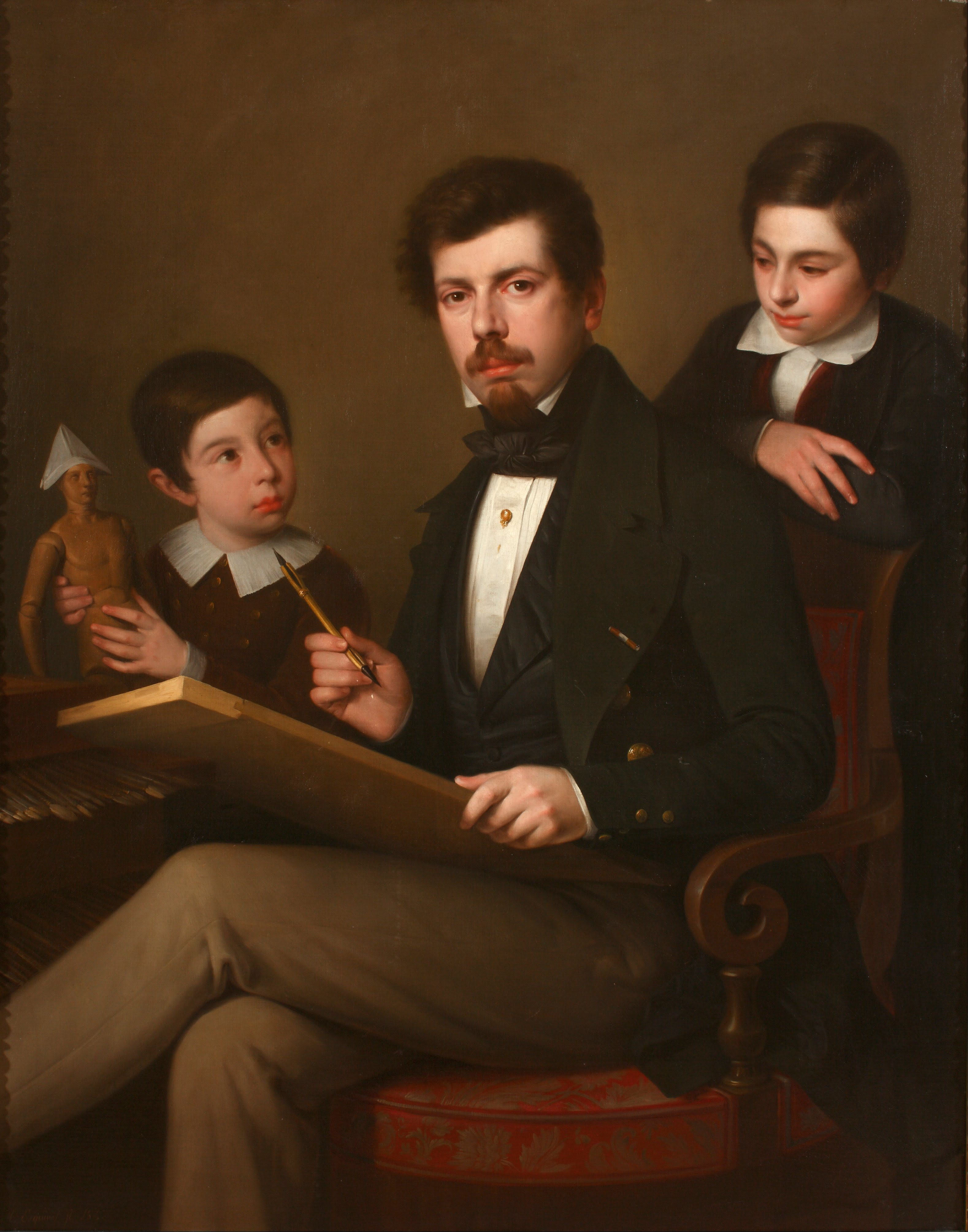 Autorretrato del pintor español Antonio María Esquivel (1806-1857), que aparece junto a sus hijos Carlos y Vicente, que también fueron pintores.